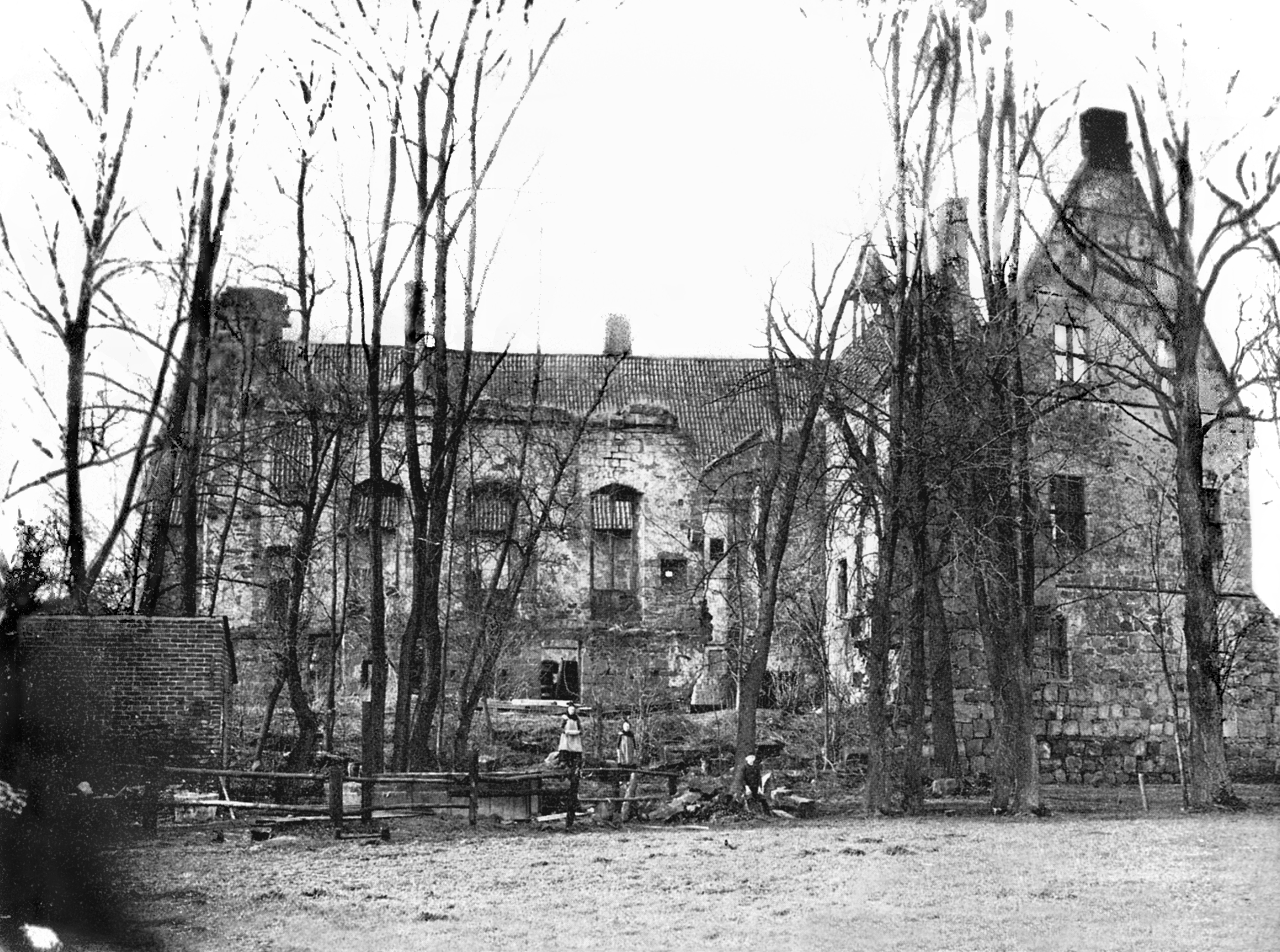 Ostseite der Burg Altena Schüttorf 1903